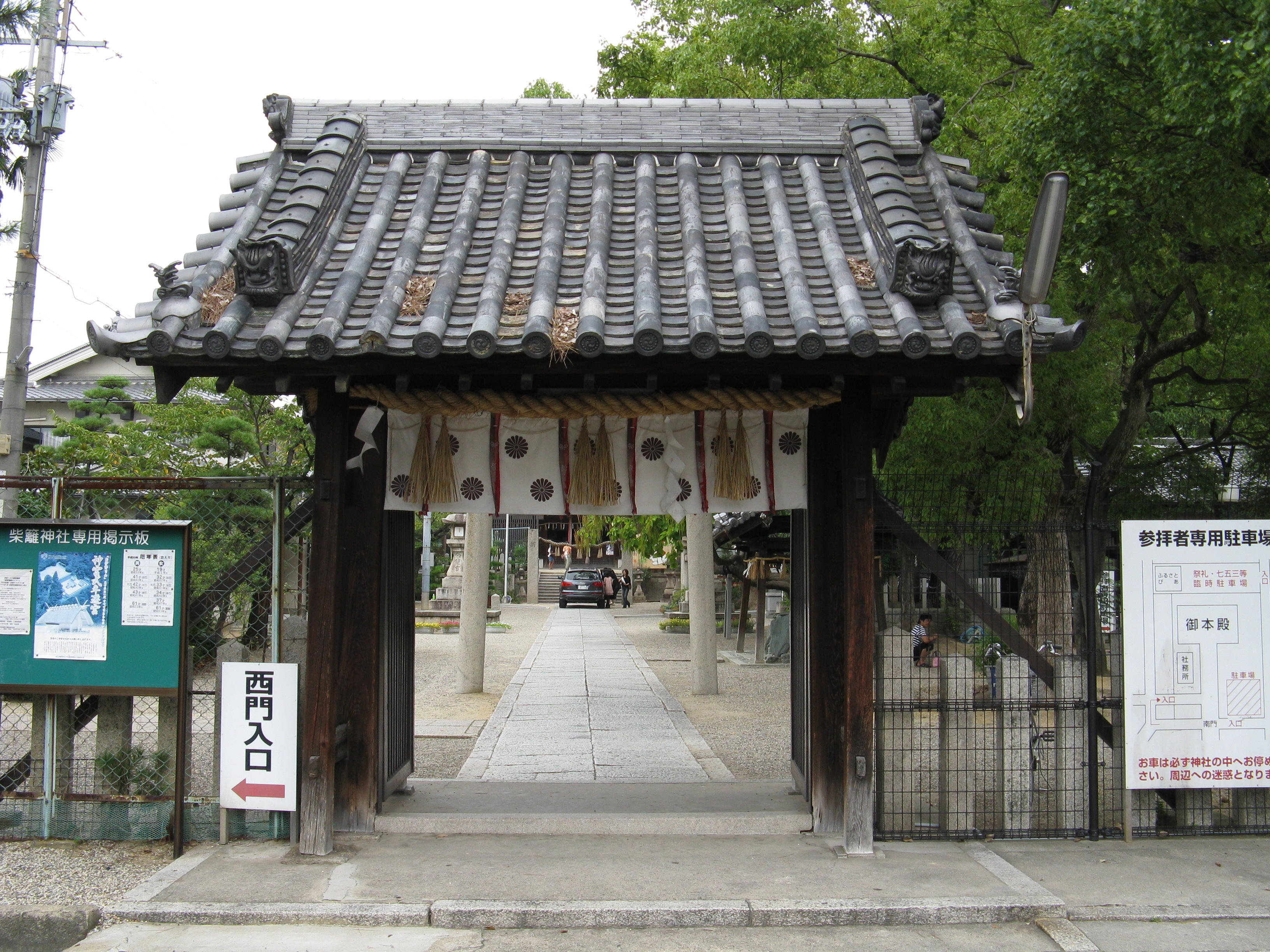 柴籬神社